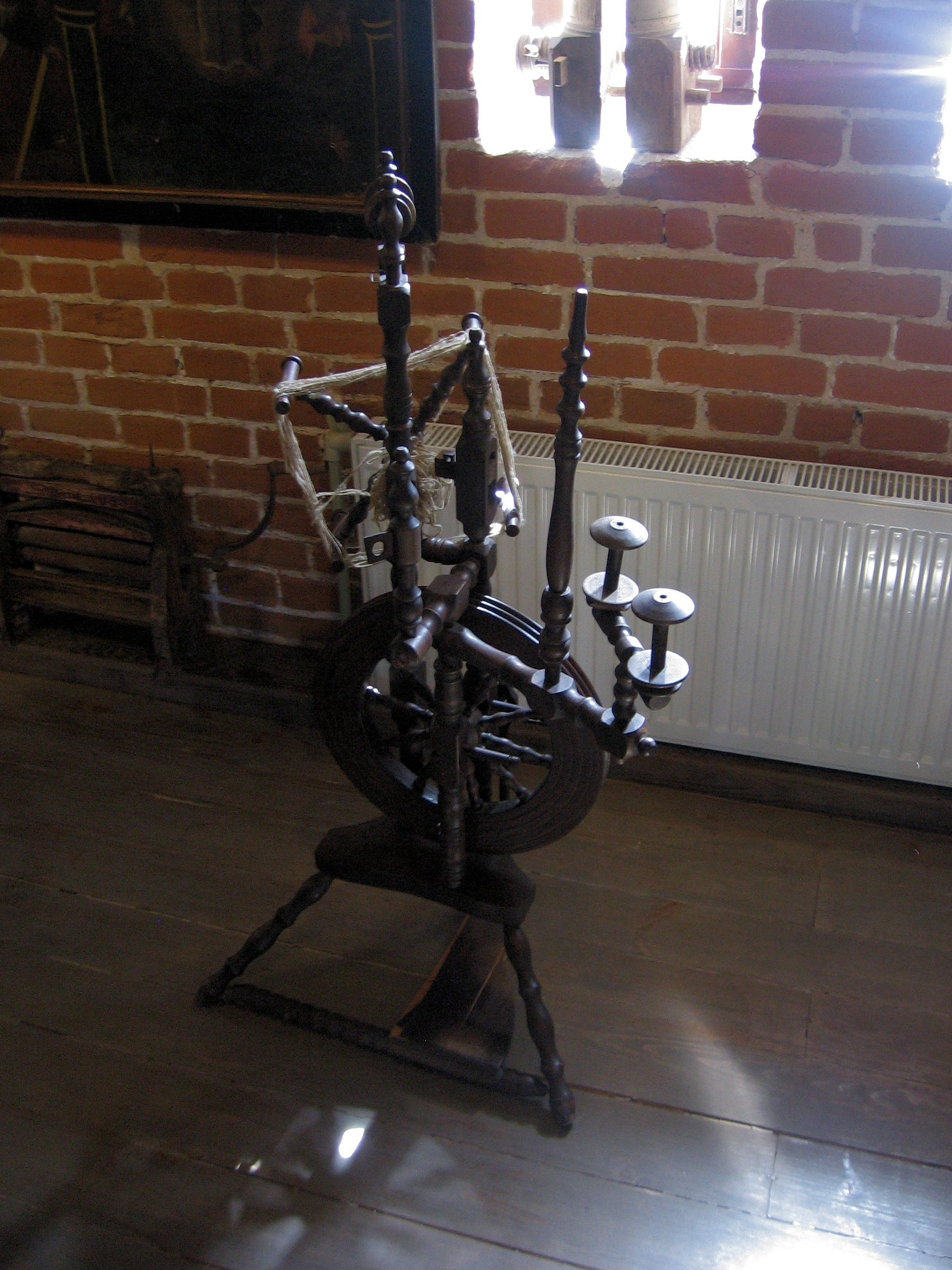 Прядка. Експонат музею домашньої ікони у Радомишлі